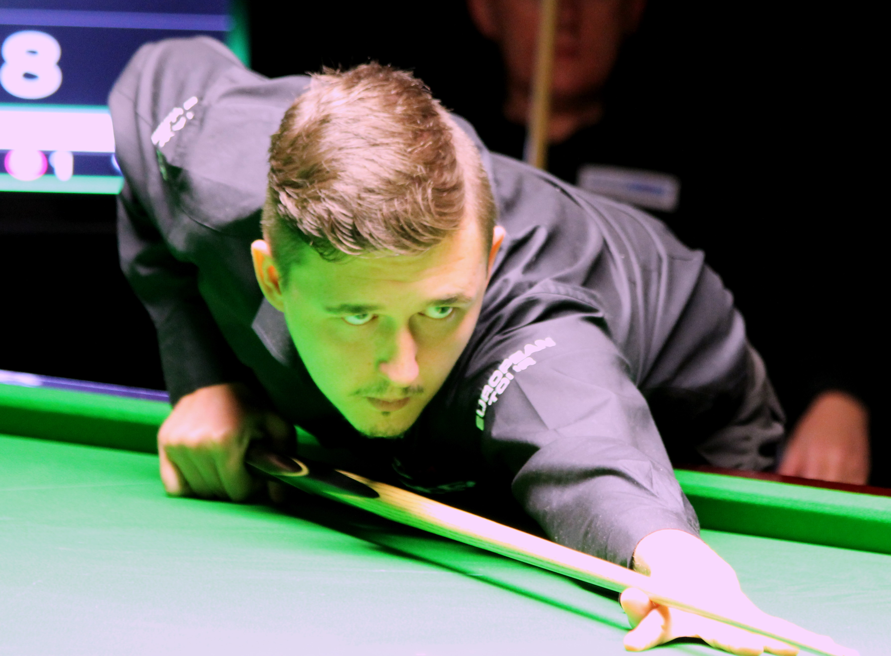 Kyren Wilson beim Paul Hunter Classic 2014